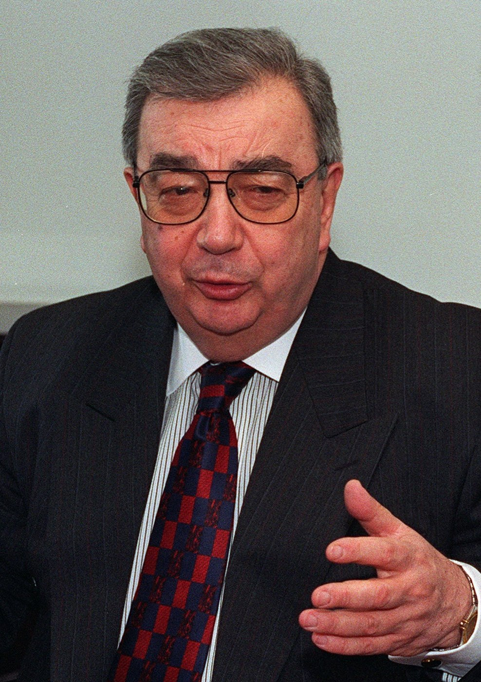 Evgenii Maksimovich Primakov (Евгений Максимович Примаков), Russian Foreign Minister